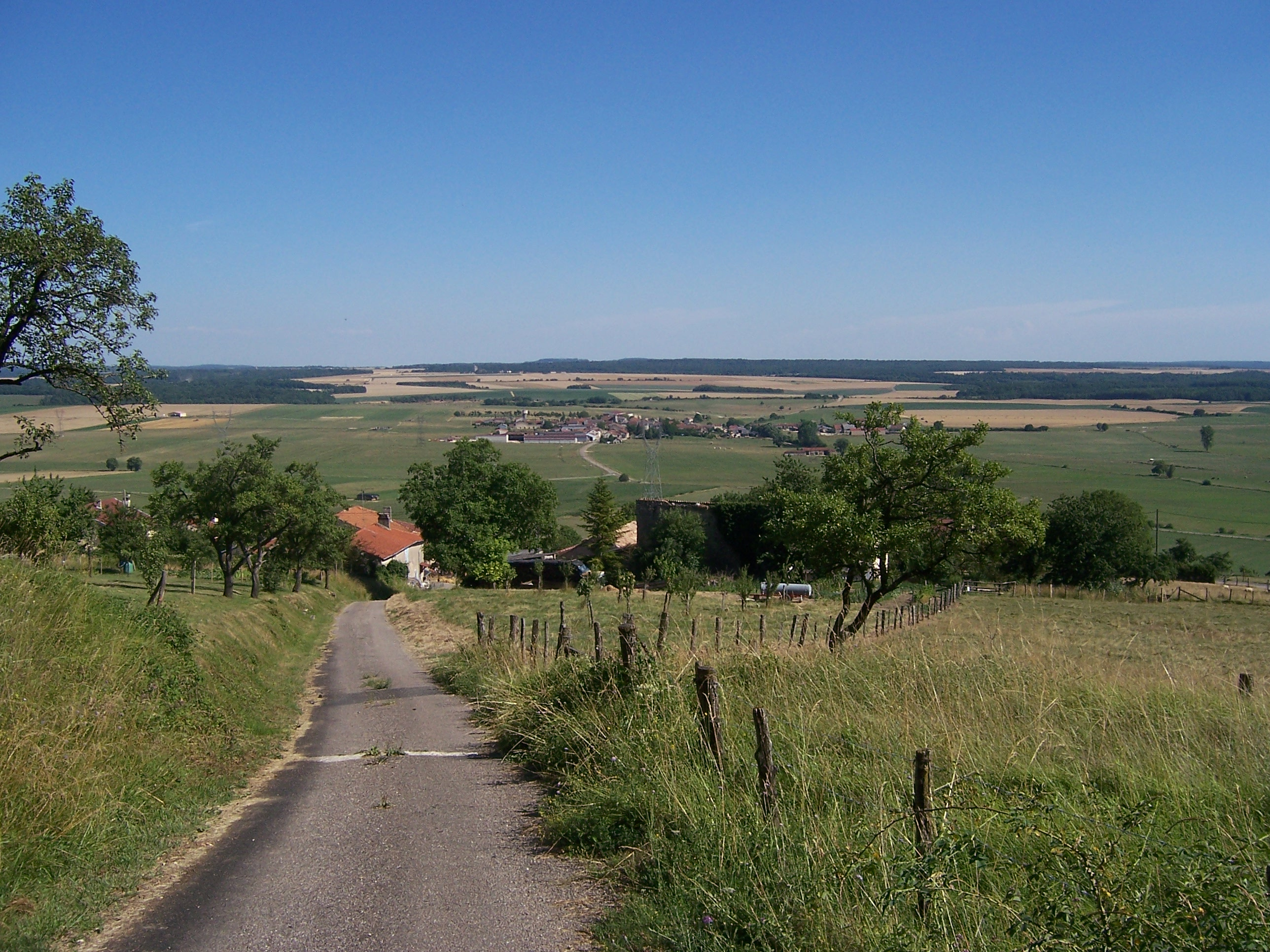 Vue depuis le haut de la "Rue du bois" du village de Clérey-la-Côte